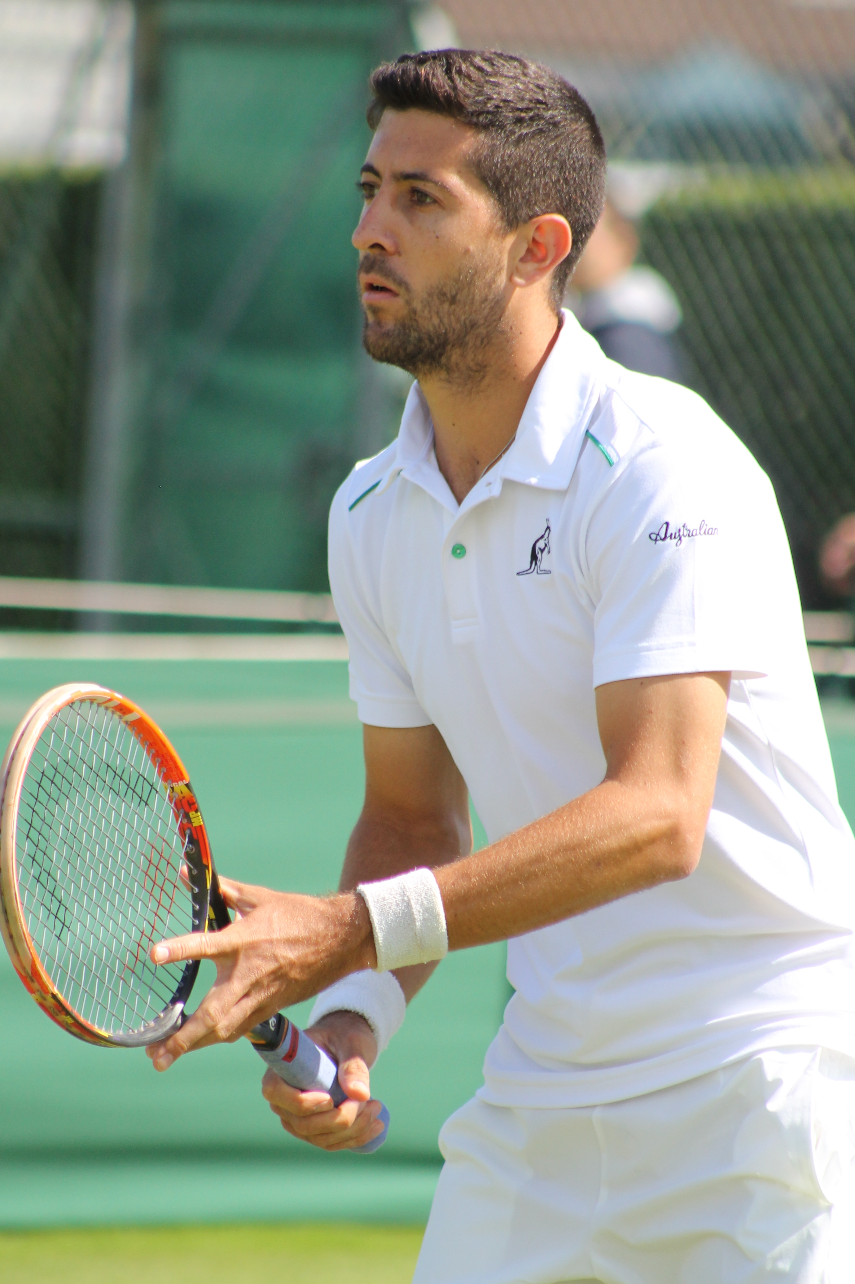 Podlipnik Castillo WMQ15 (2)